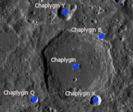 Cráter Chaplygin. Cráteres satélite (LROC)